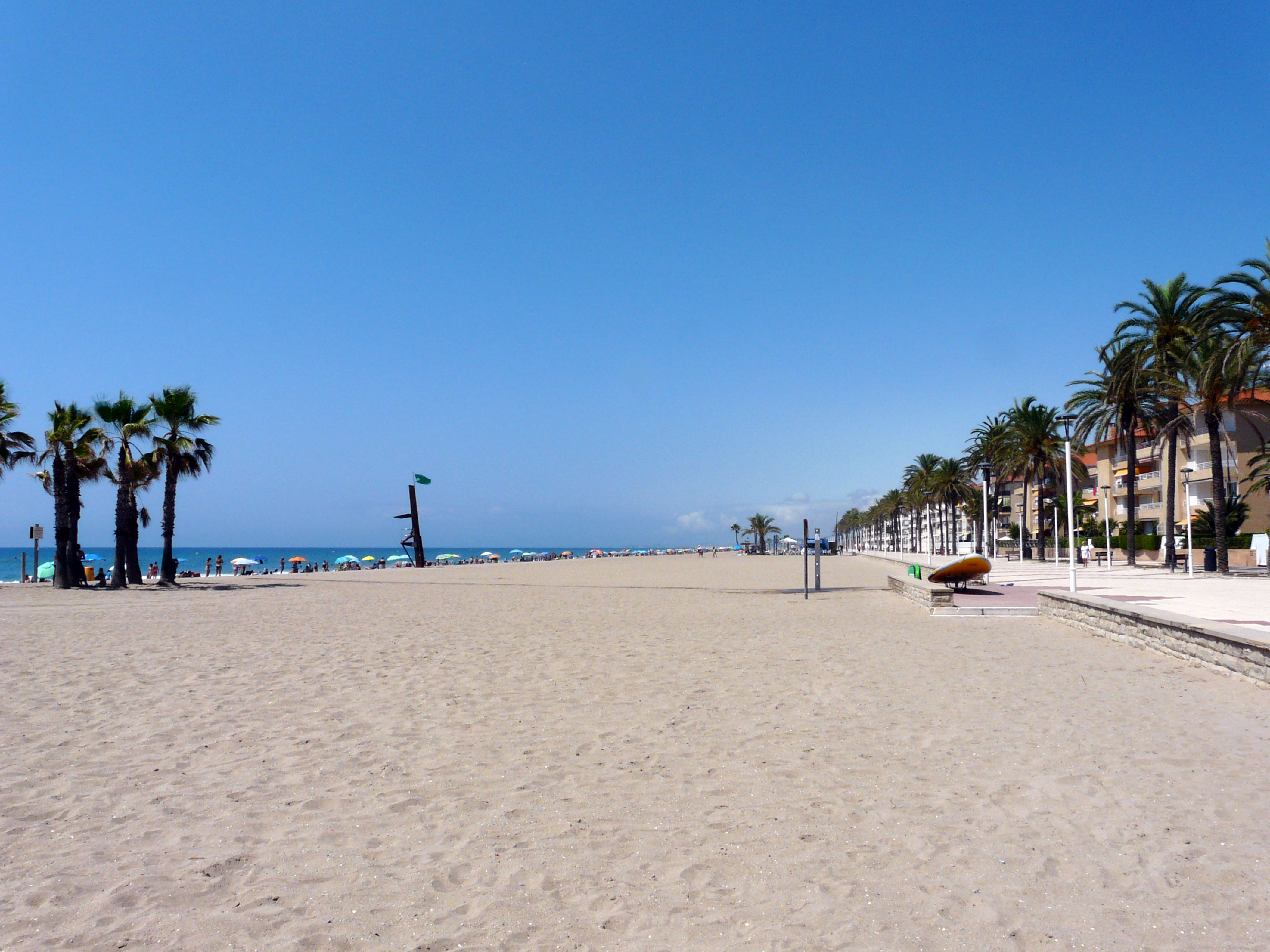 Побережье Коста Дорада